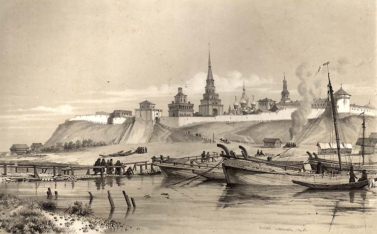 Крепость со стороны Казанки. Литография из альбома Андре Дюрана.